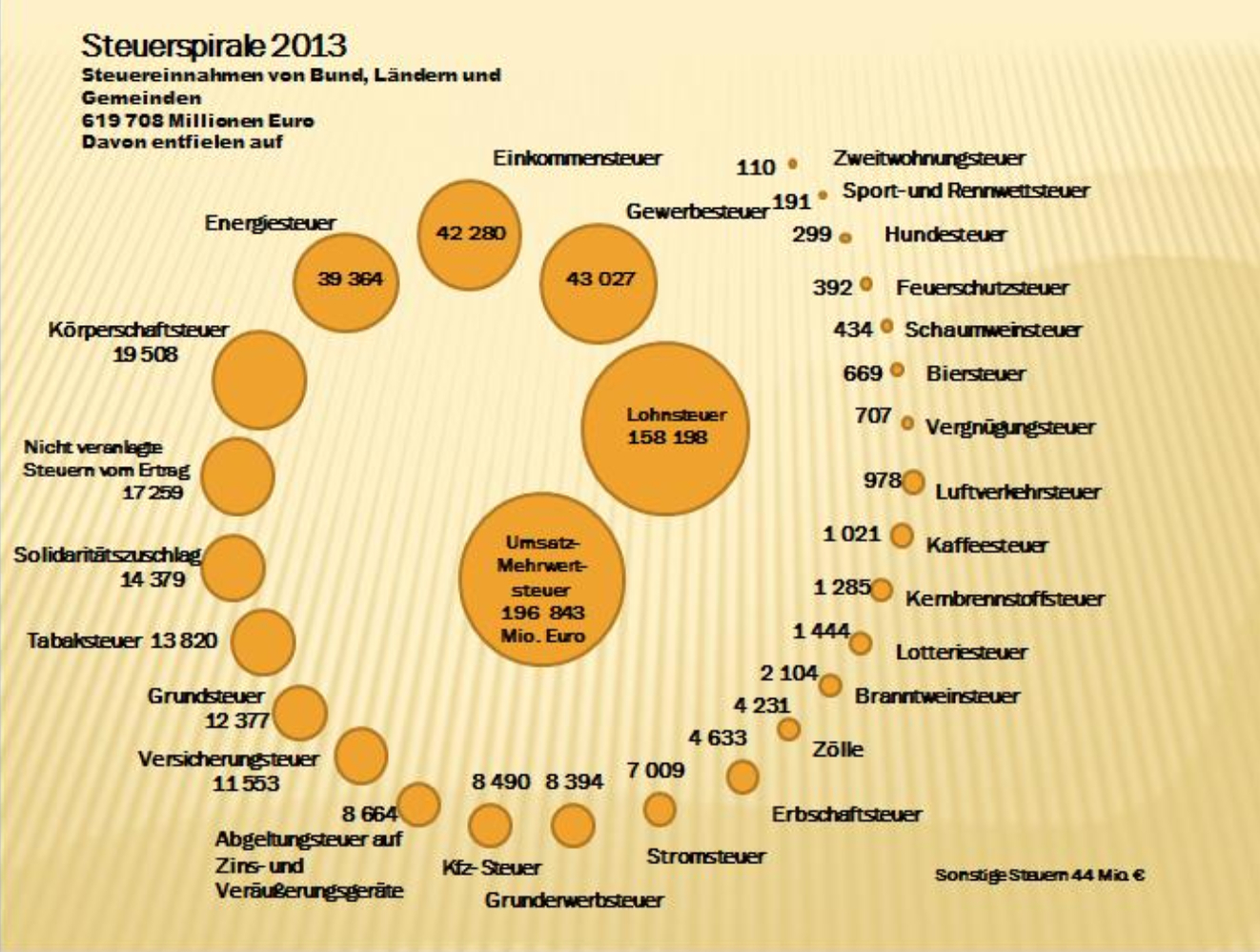 Steuerspirale 2013